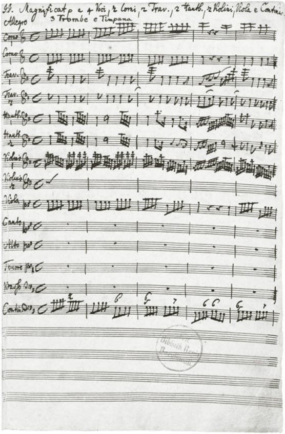 Manuscrito do Magnificat, com a seção Magnificat anima mea